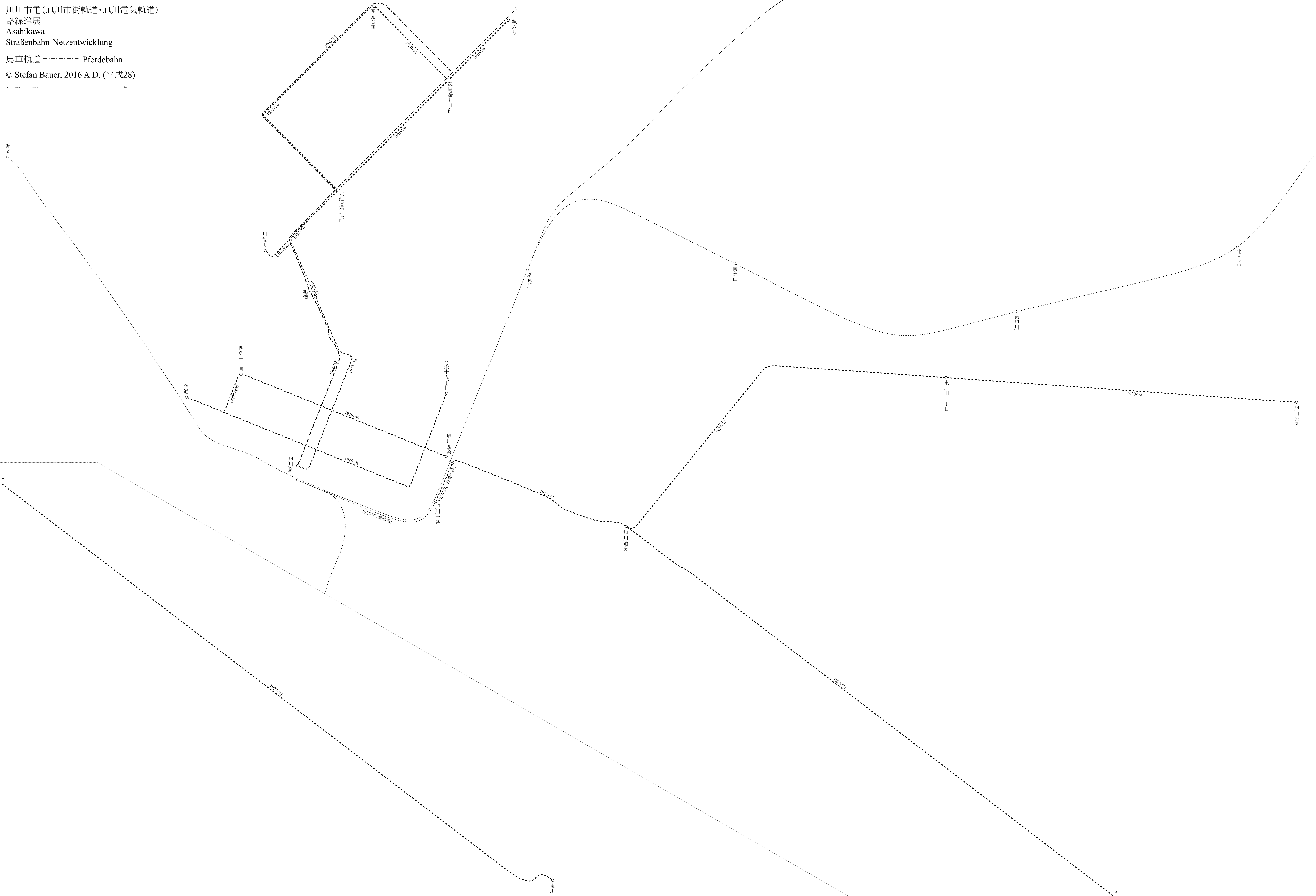 旭川市電（旭川市街軌道と旭川電気軌道）の路線進展図